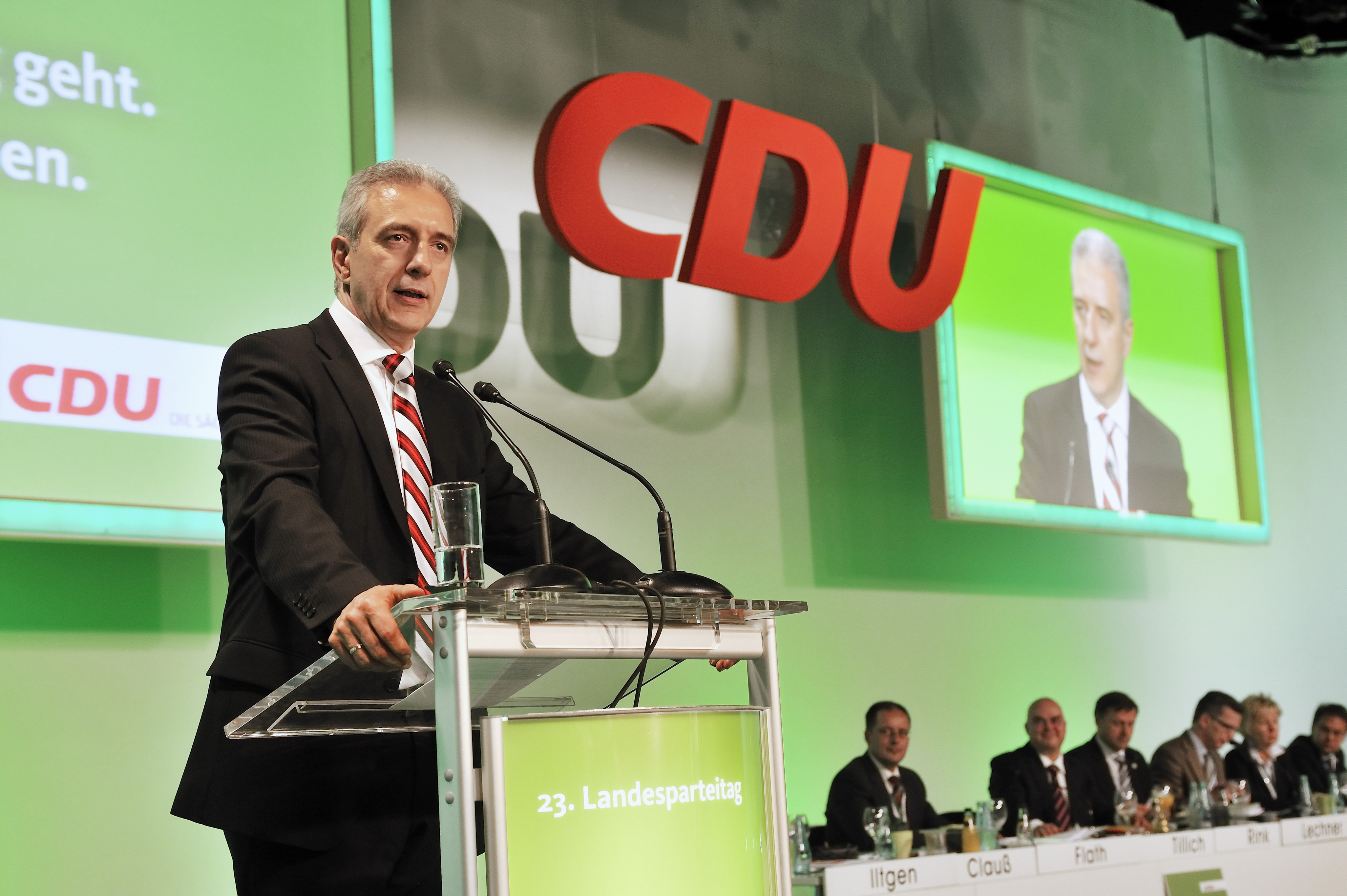 Stanislaw Tillich beim 23. Landesparteitag der Sächsischen Union am 16. Juni 2009 in Leipzig